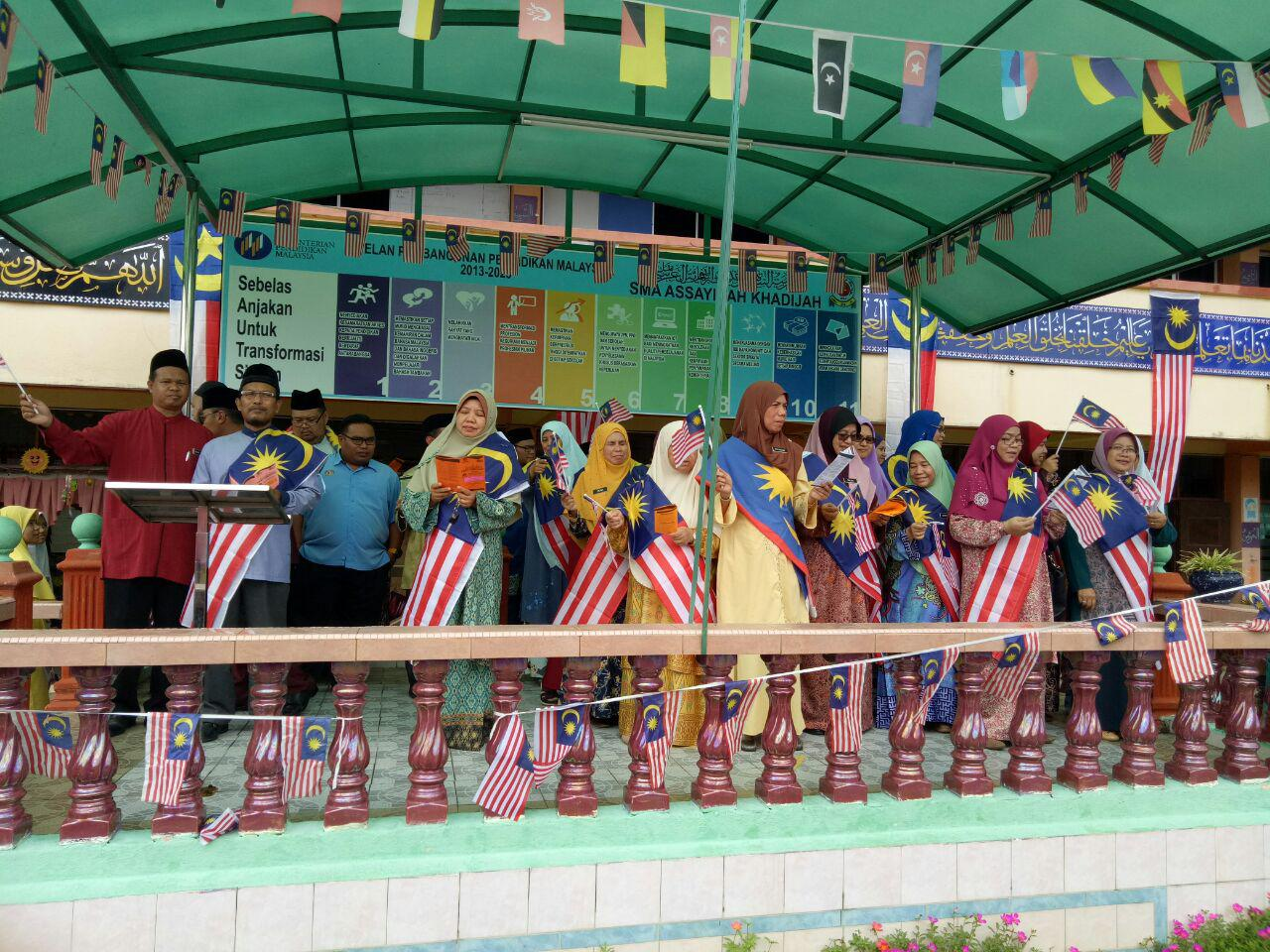 Lagu Kemerdekaan